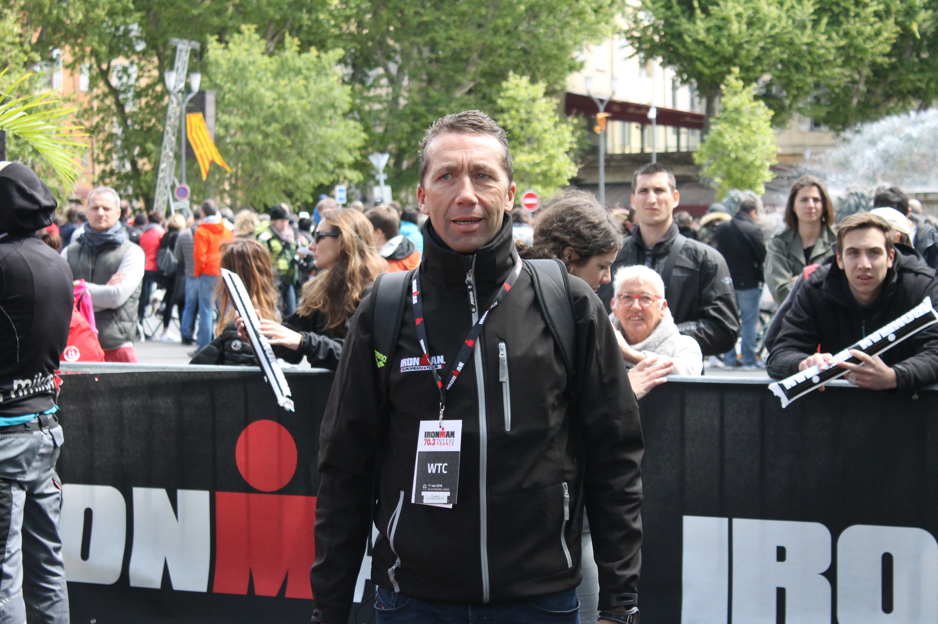 Yves Cordier Directeur Ironman France sur l'Ironman 70.3 Pays d'Aix 2016